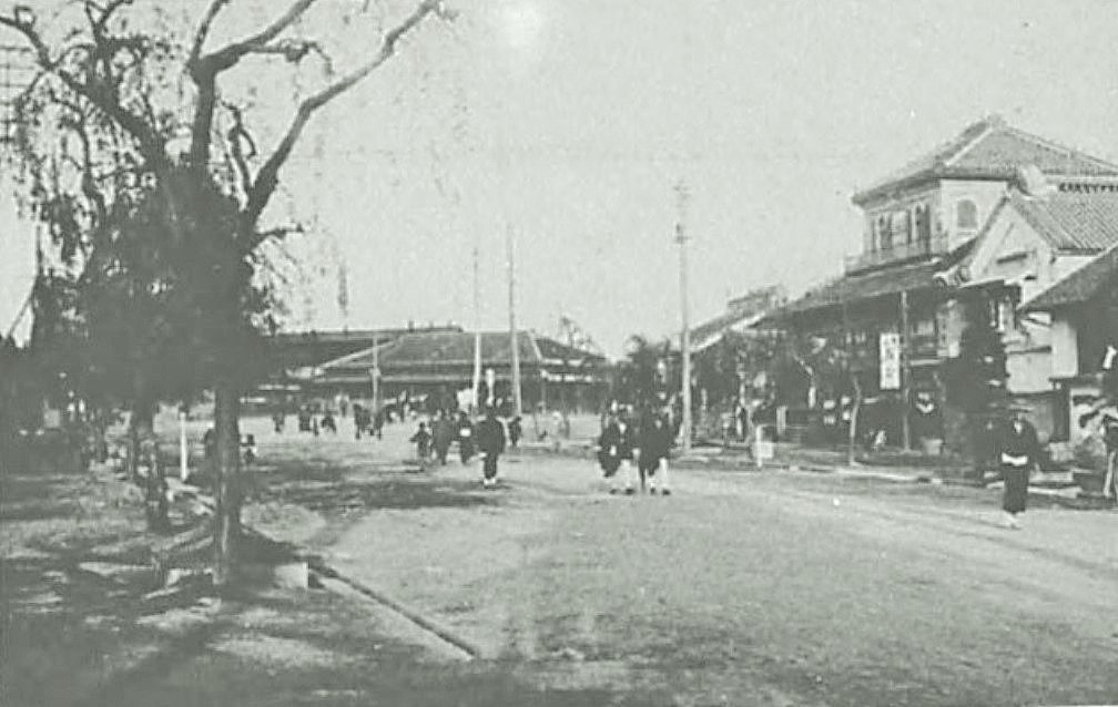 明治末期の浜松駅前